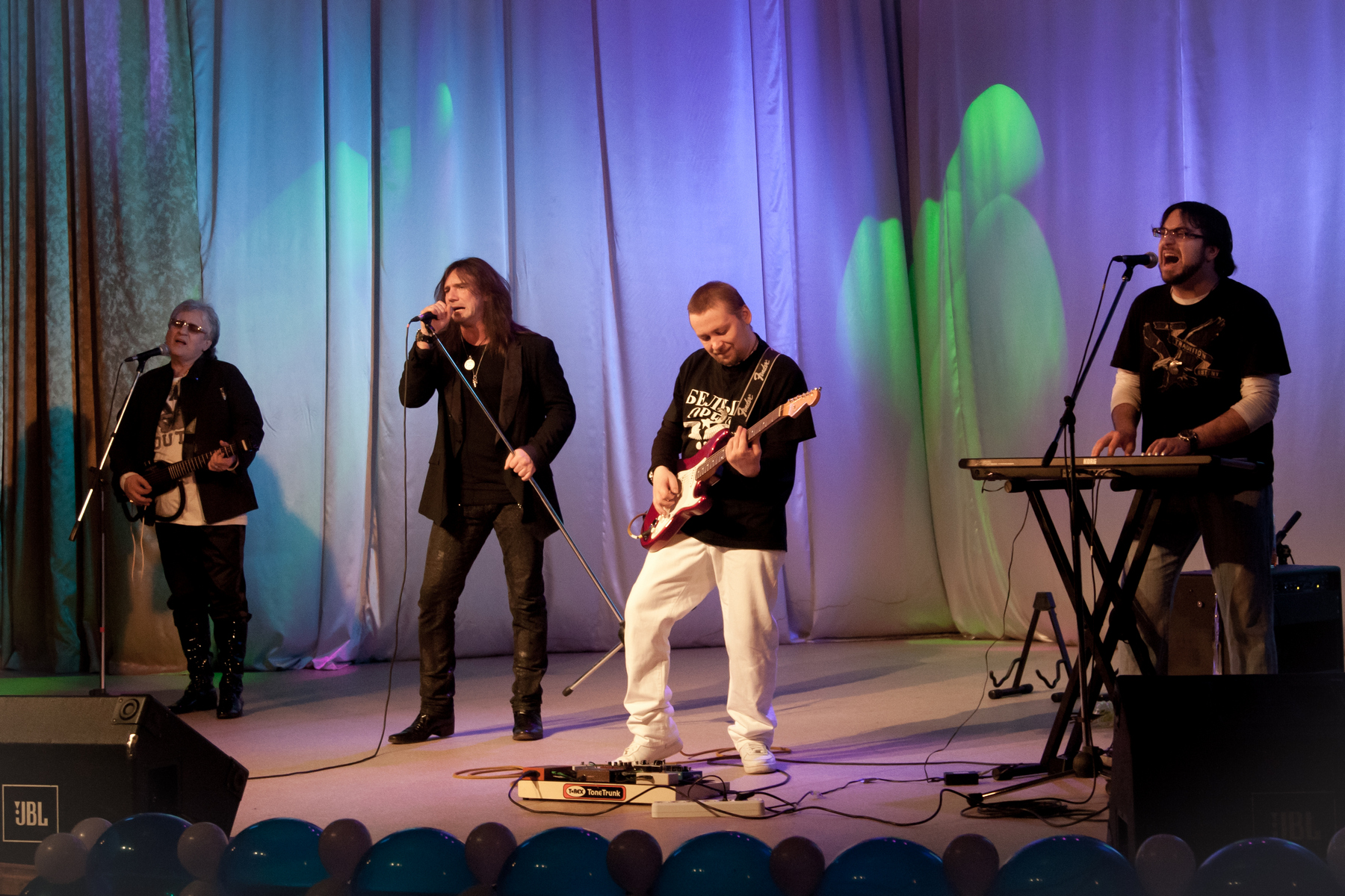 Группа Белый орёл; концерт в МАУ «Центр культуры и общественных мероприятий»